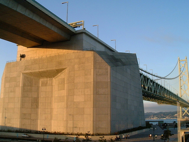 Akashi-Bridge